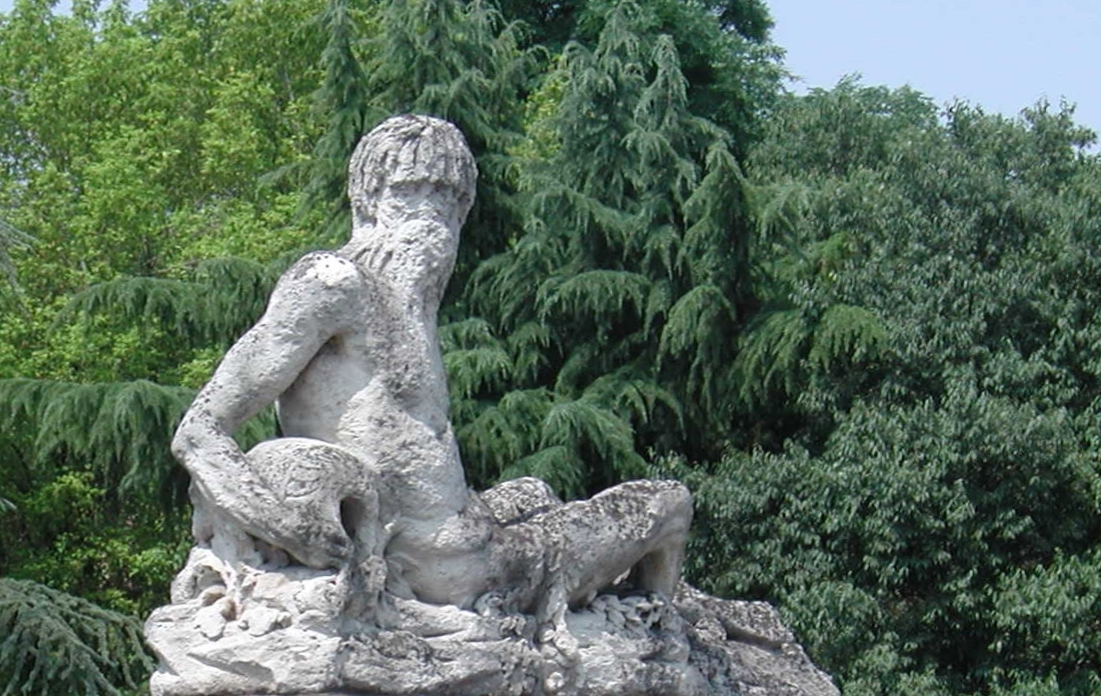 Reggio Emilia Statua del ponte Crostolo Statue on the bridge Crostolo XVIII century author Paolo da Reggio